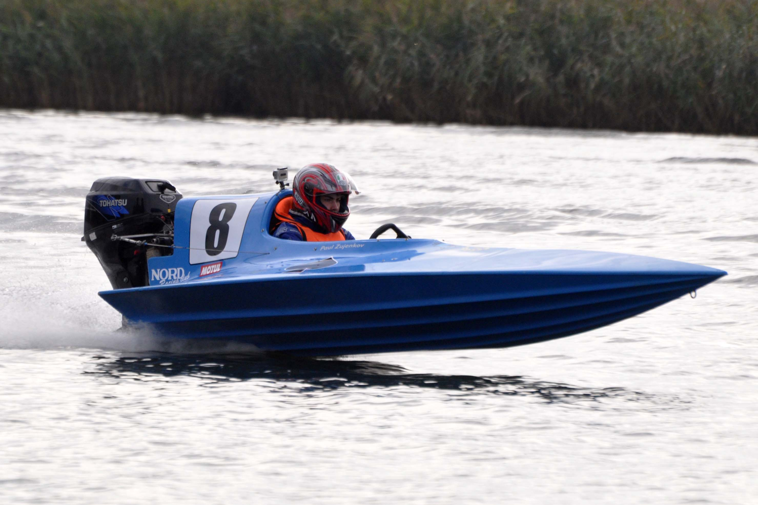 Maailmameister veemotos Paul Zujenkov